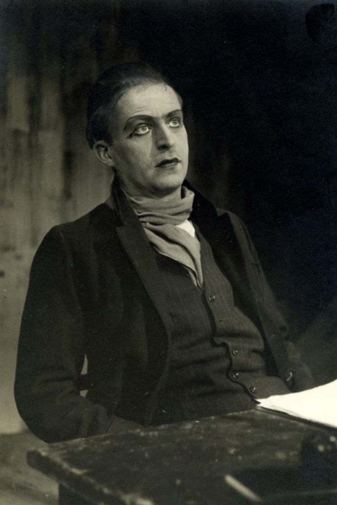 Ivan Cankar, Lepa Vida, Narodno gledališče v Ljubljani. Na fotografiji: Slavko Jan (Poljanec).